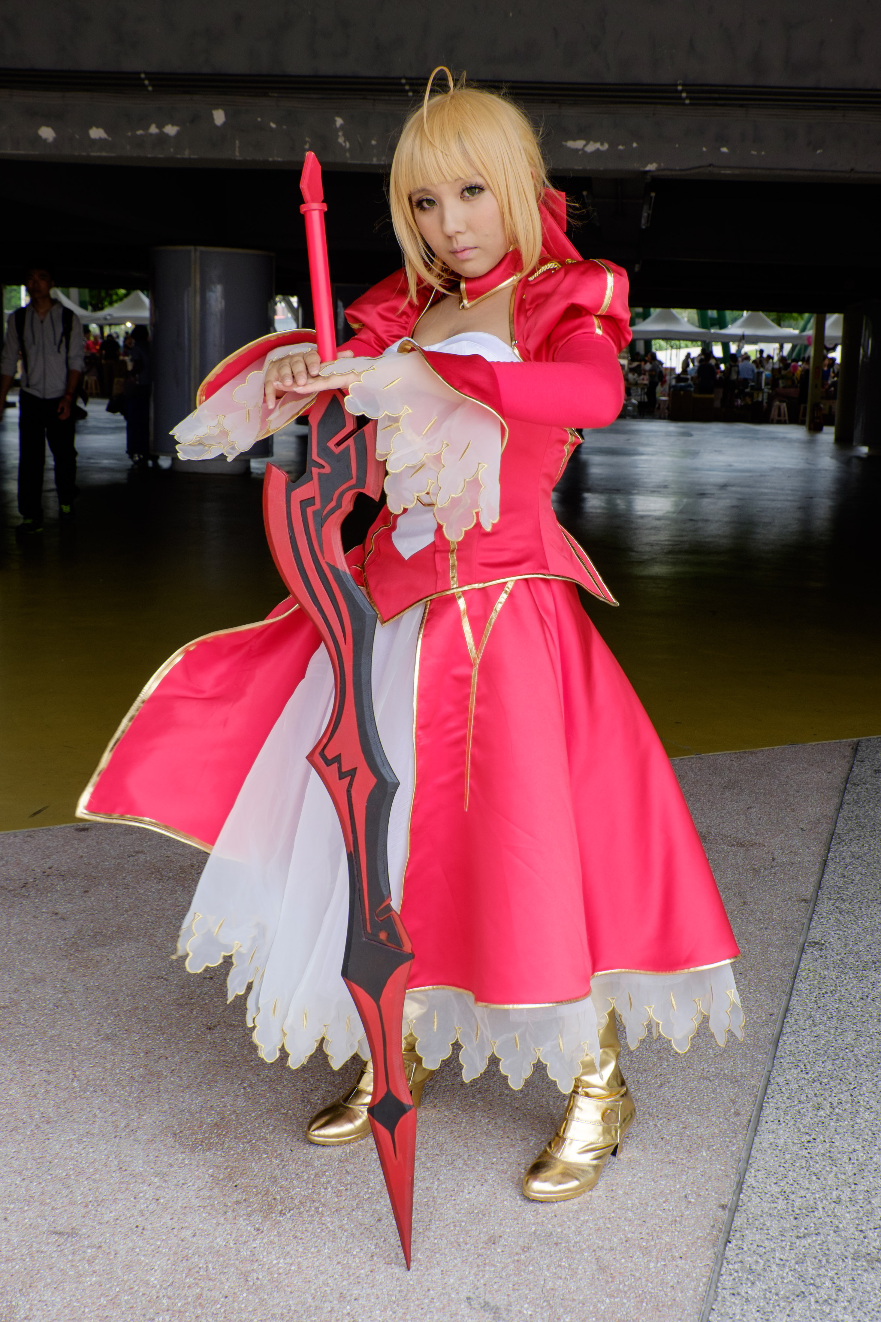 PF22上午，＜Fate/EXTRA＞Saber（尼祿）cosplayer。